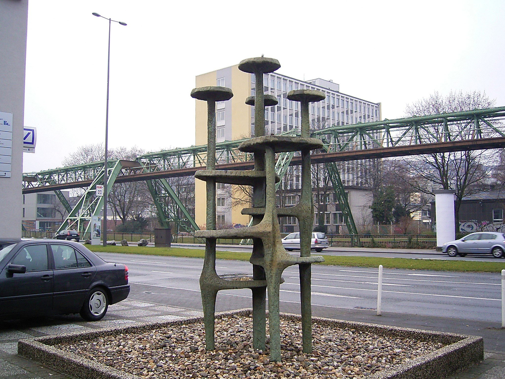 Wuppertal - Barmen